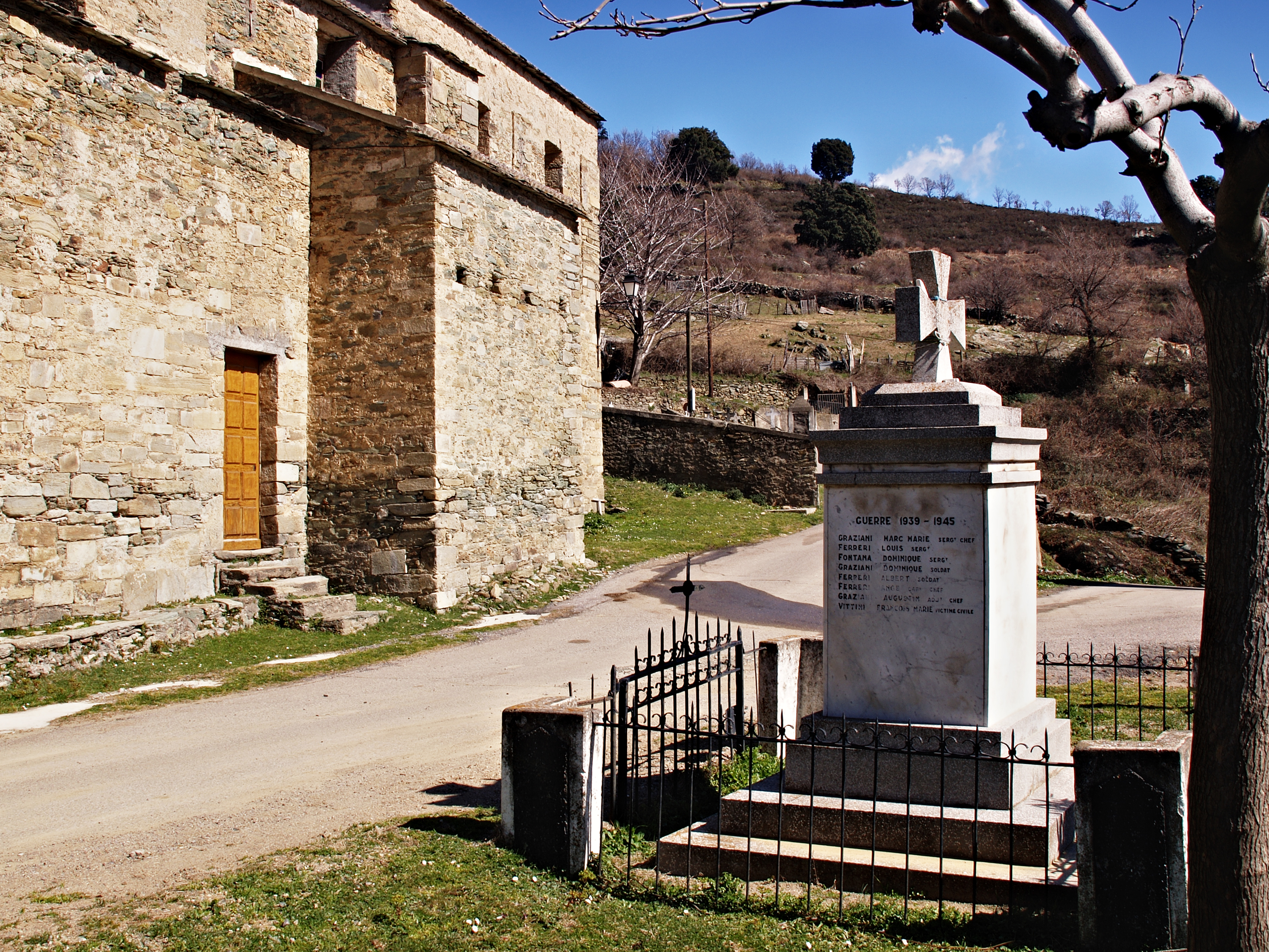 Bigorno (Corsica) - Monument aux morts